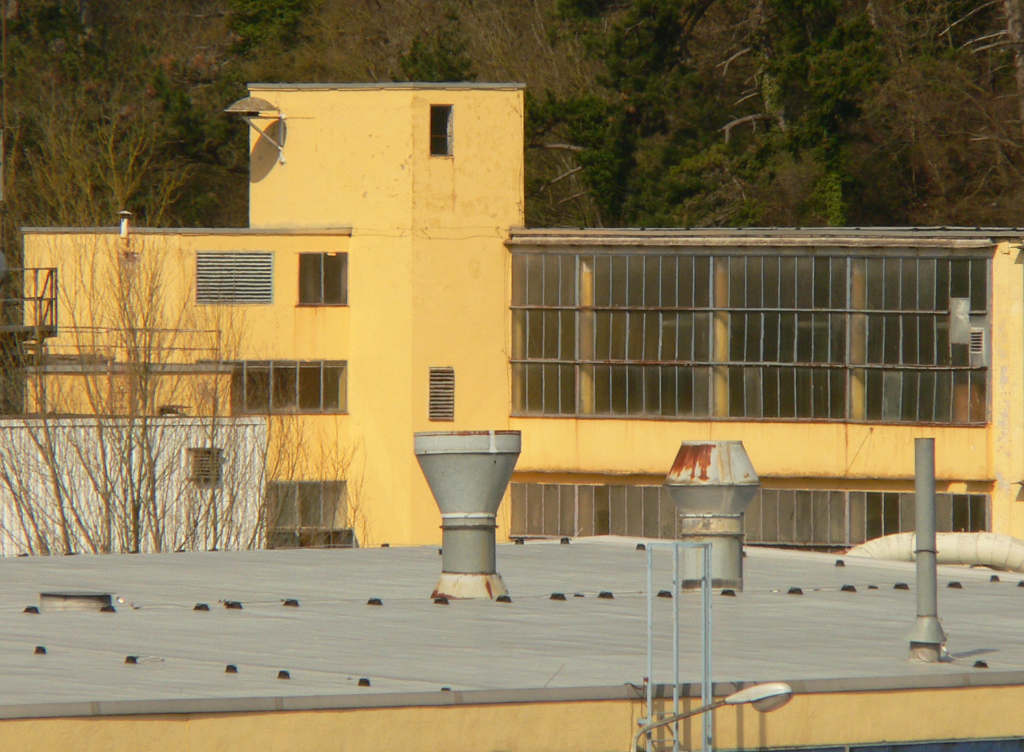 Das 1925 errichtete AMCO-Fabrikerweiterungsgebäude von Westen mit dem Turmbau und Fensterband